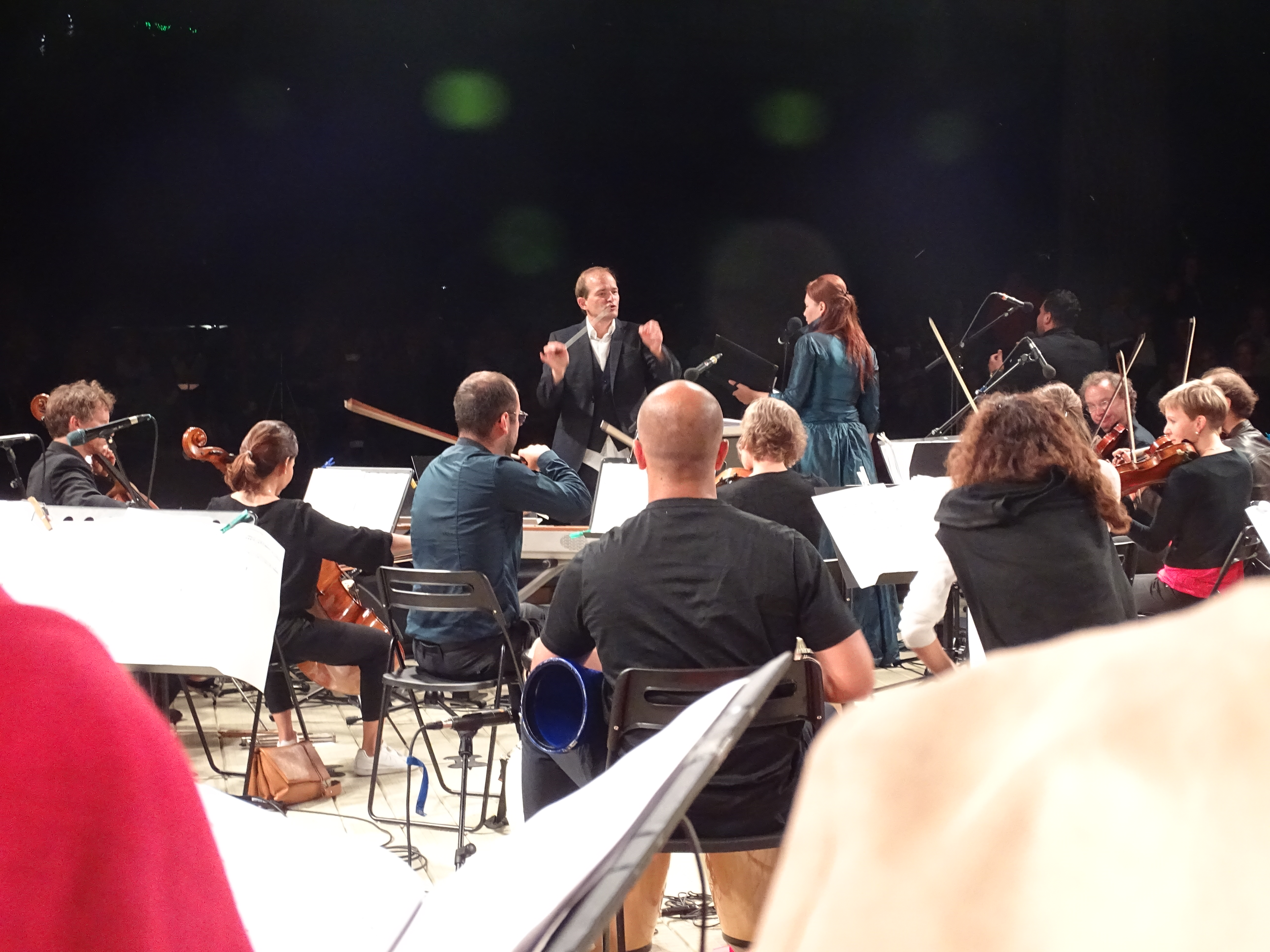 Aufführung der Missa Latina in Sindelfingen auf dem Klostersee. Leitung Adrain Werum, Solistin Cornelia Lanz